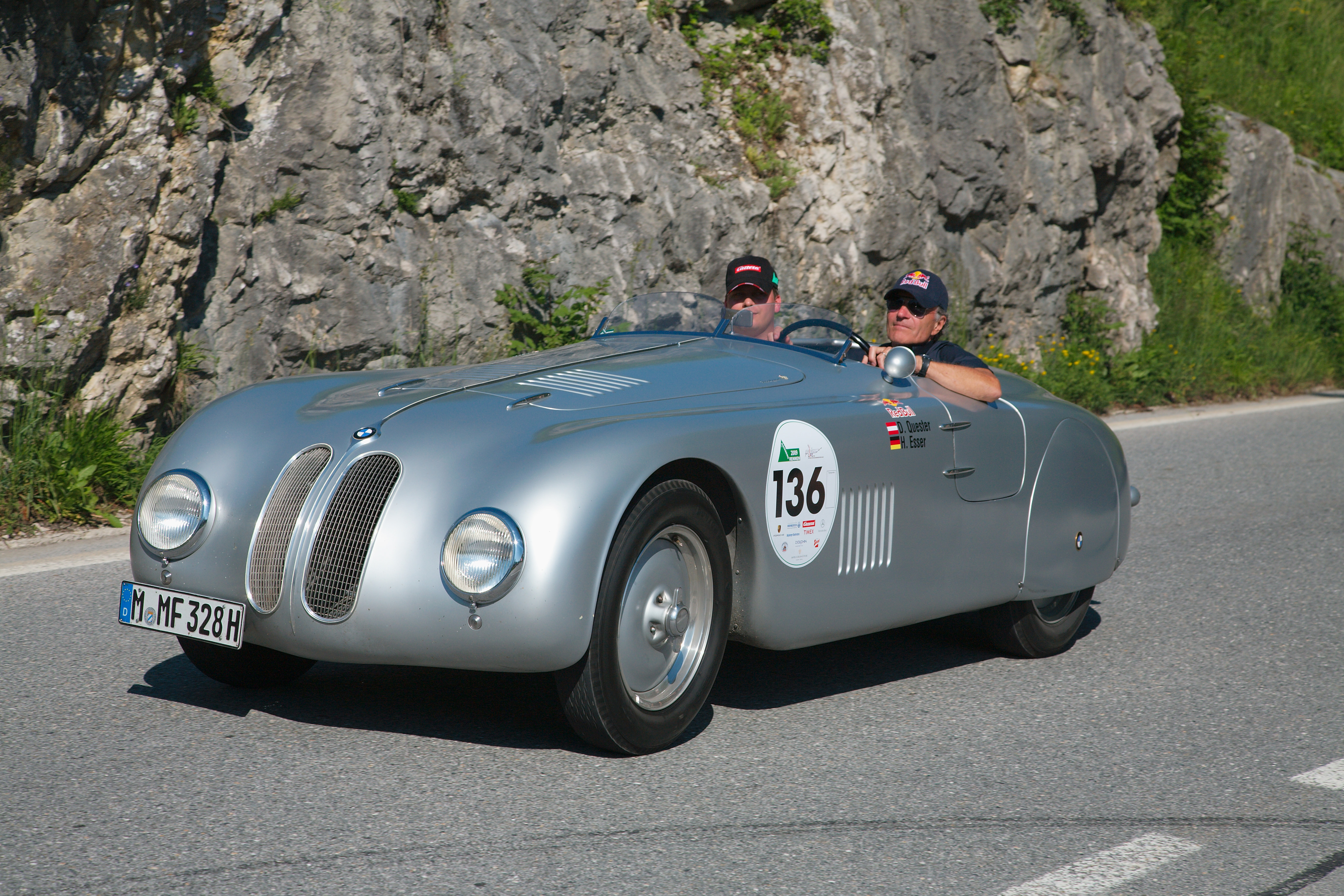 1940 BMW 328 Spezial at Gaisbergrennen 2009